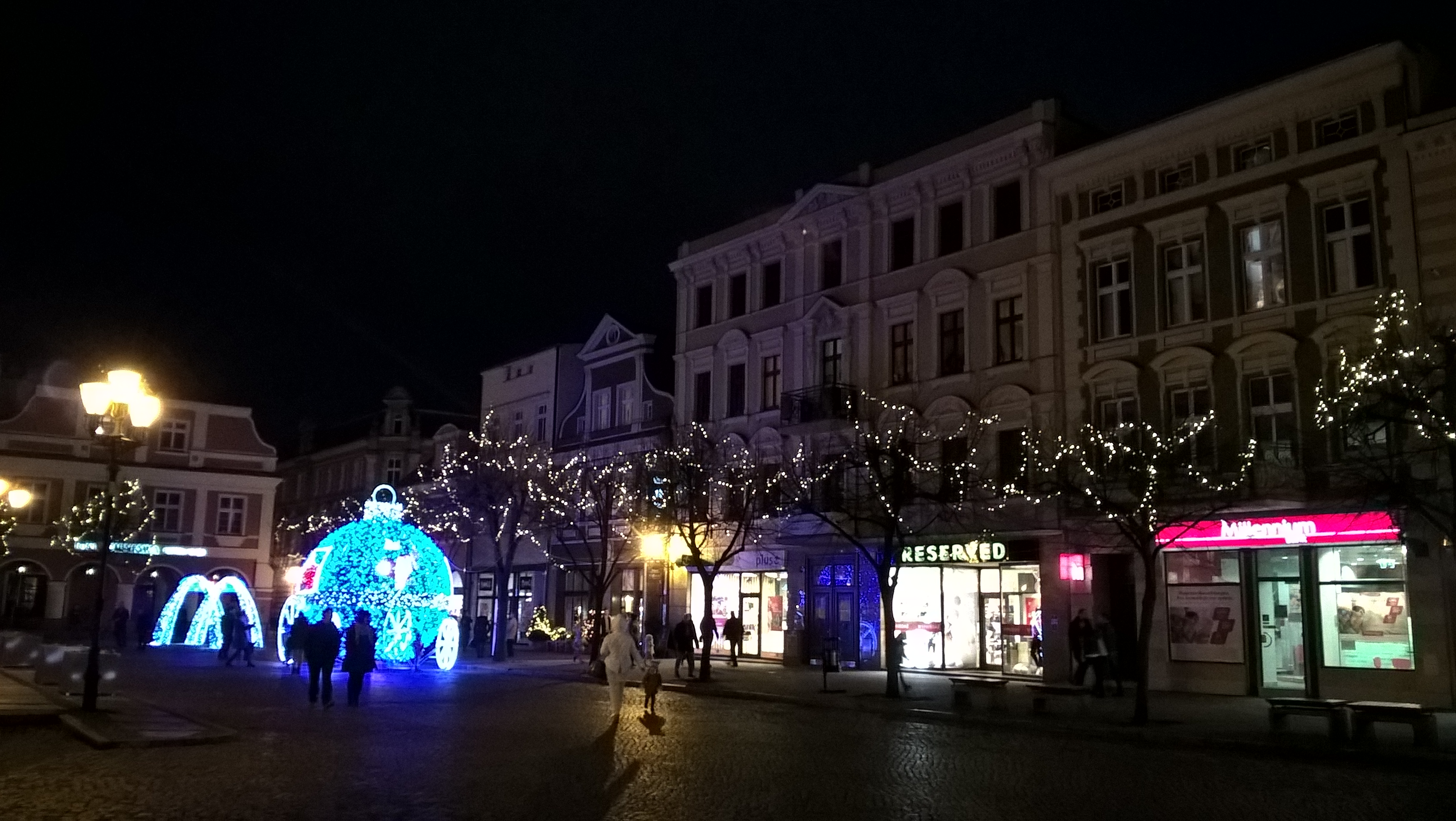 Leszno, Stary Rynek-pierzeja południowa, grudzień 2015